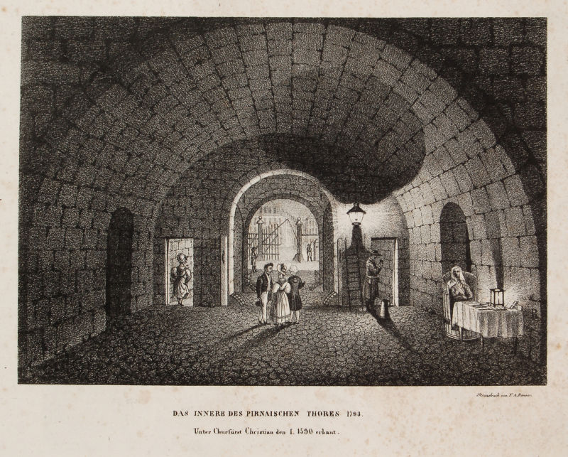 Dresden, Das Innere des Pirnaischen Thores 1763(?)